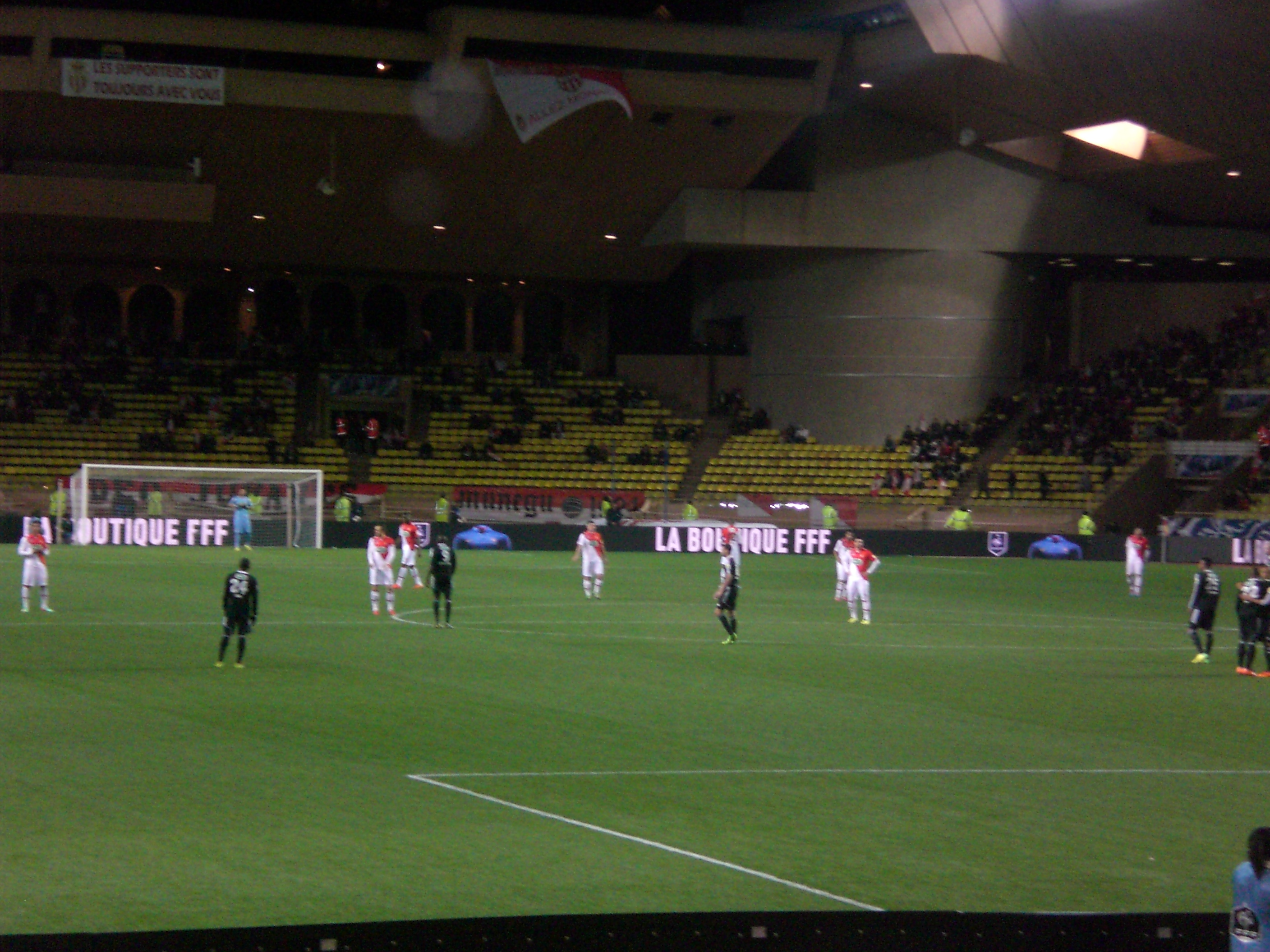 Coup d'envoi du match Joueurs de l'AS Monaco, s'échauffant avant le match Monaco - Lens, quart de finale de la Coupe de France de football.